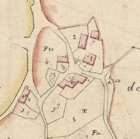 Planès de Dellà en el Cadastre napoleònic del 1812 (Arxius Departamentals dels Pirineus Orientals)